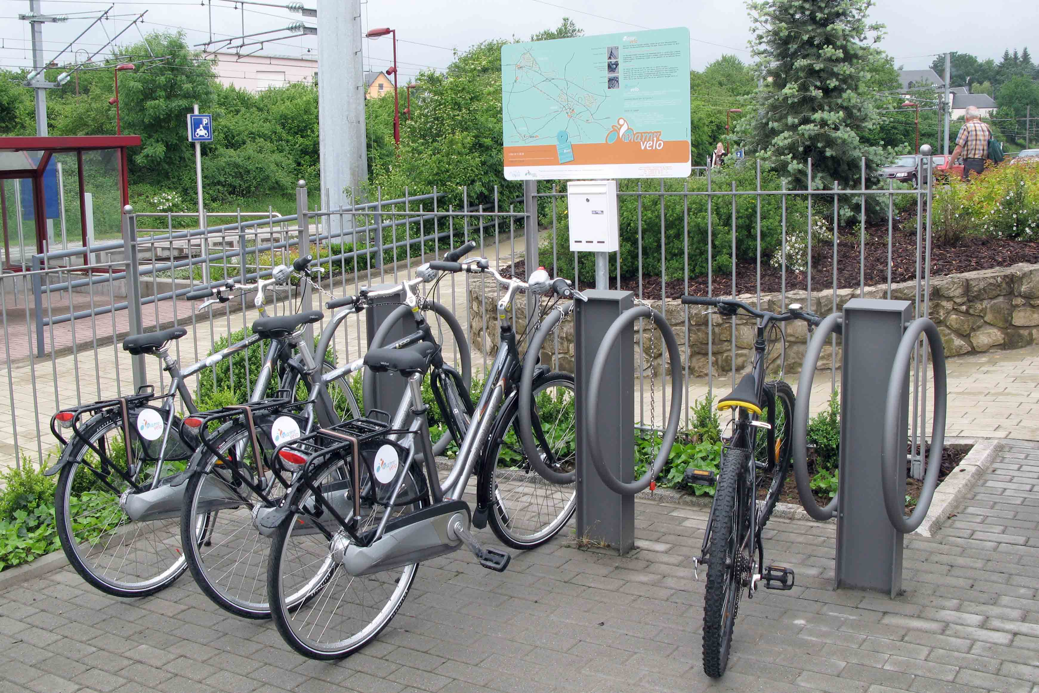 mamer velo Mamer Gare.